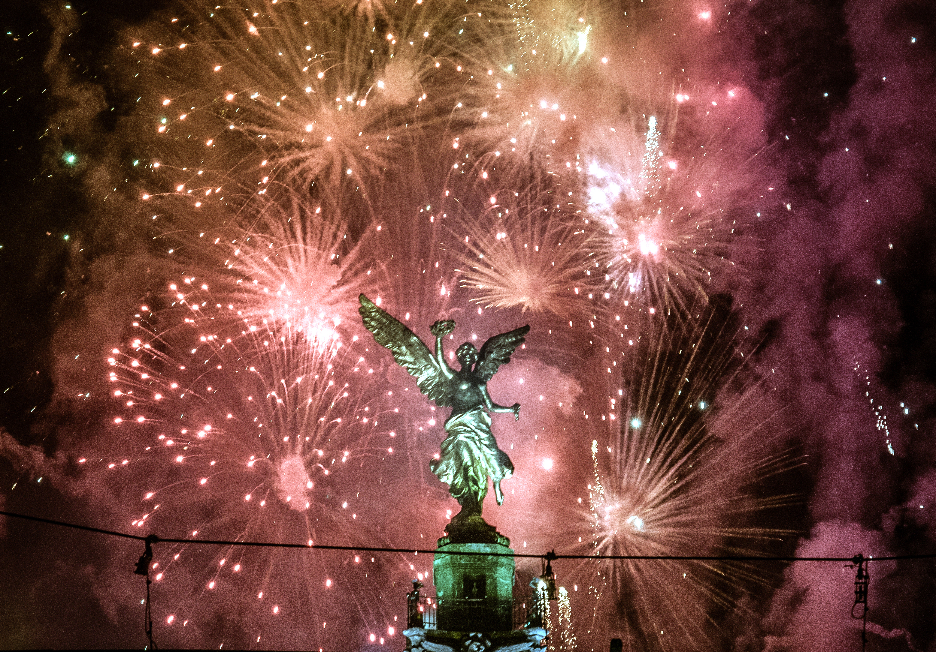 La ciudad de México celebra la llegada del 2013 en el Ángel de la Independencia. Se estima que asistieron 42mil personas. Lee la nota completa en Revolución 3.0